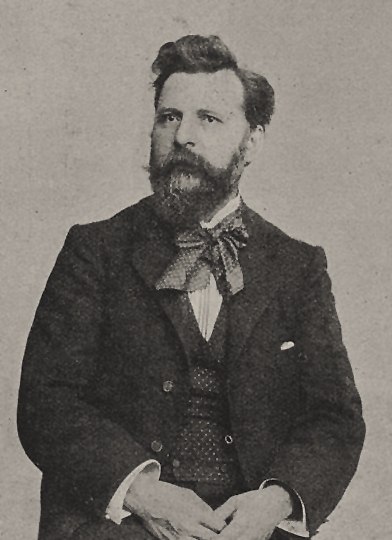 Bildhauer Gustav Rutz, Düsseldorf, Foto in der Zeitschrift "Rhein und Düssel" (Nr. 24), vom 12. Juni 1904